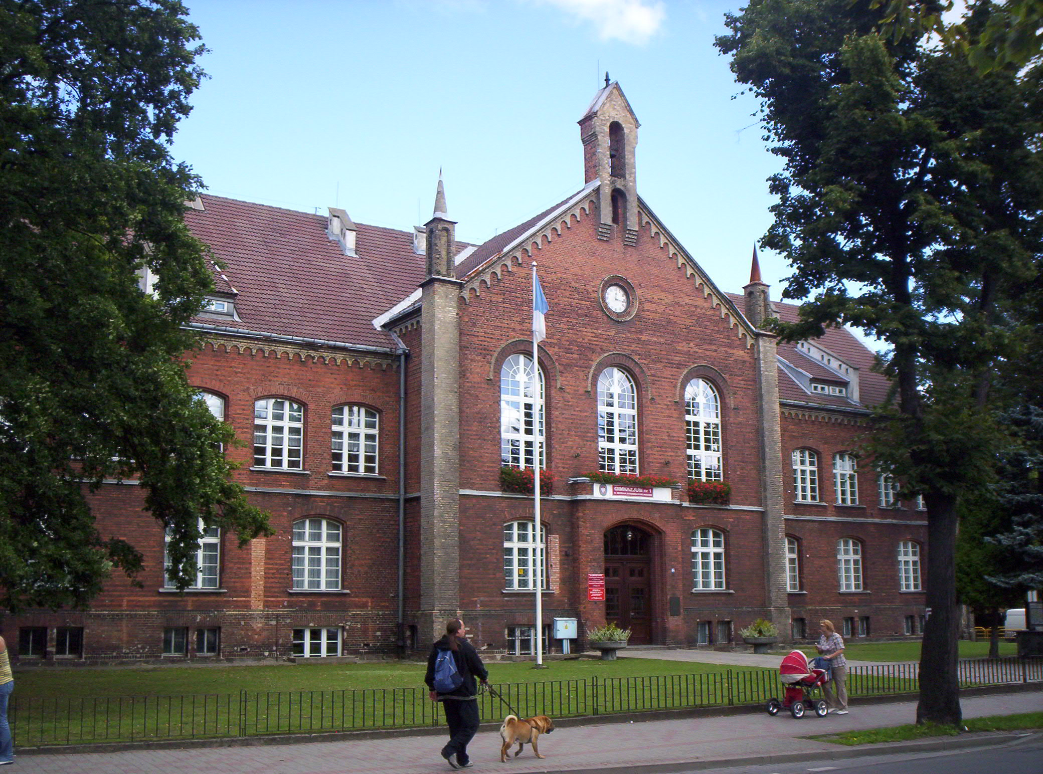 Wejherowo, ulica Sobieskiego 300 - gimnazjum nr 1 im. Mikołaja Kopernika, 1866